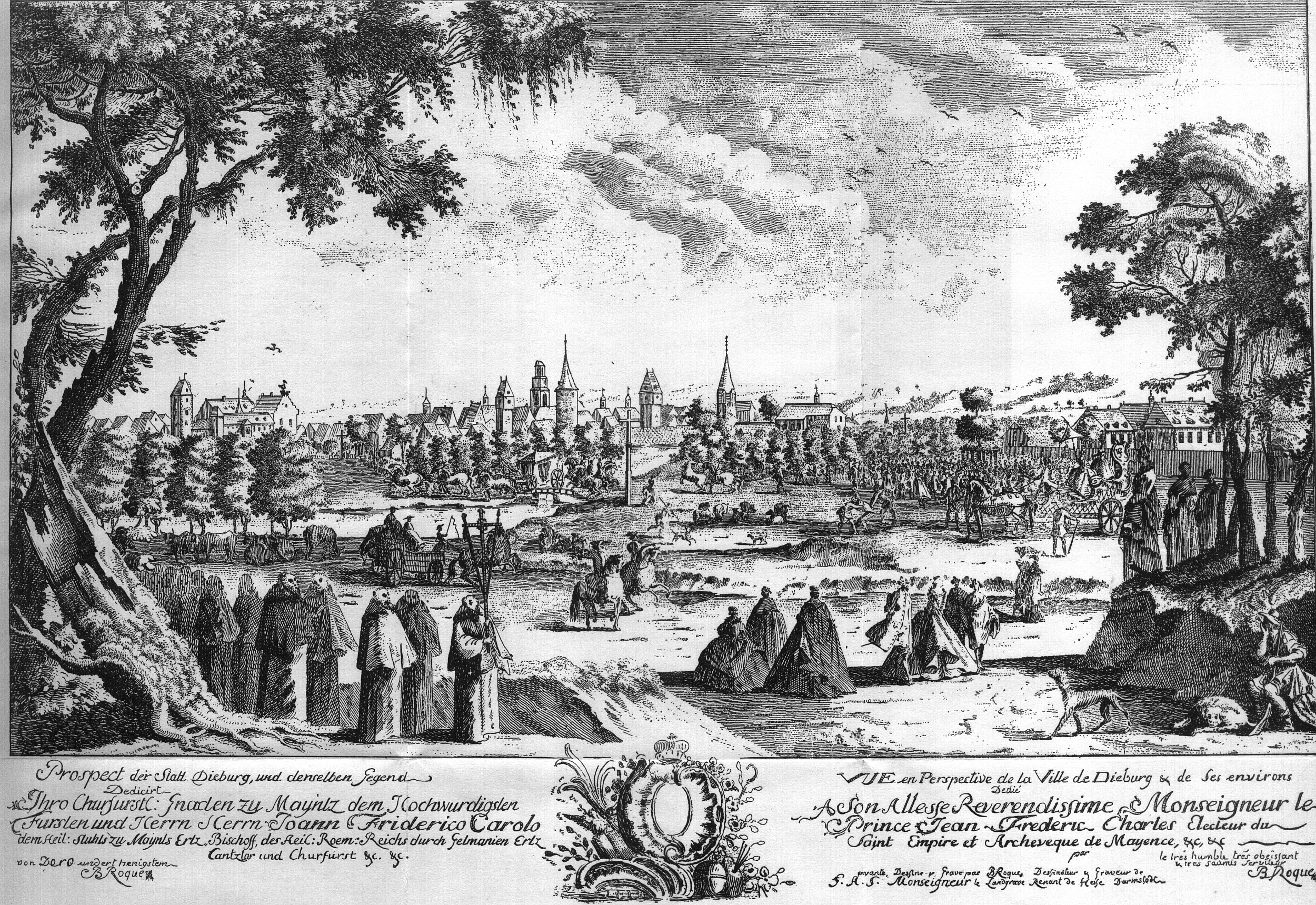 Dieburg, Kupferstich von B. Roque